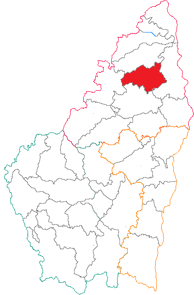 Situation du canton dans le département de l'Ardèche (France)